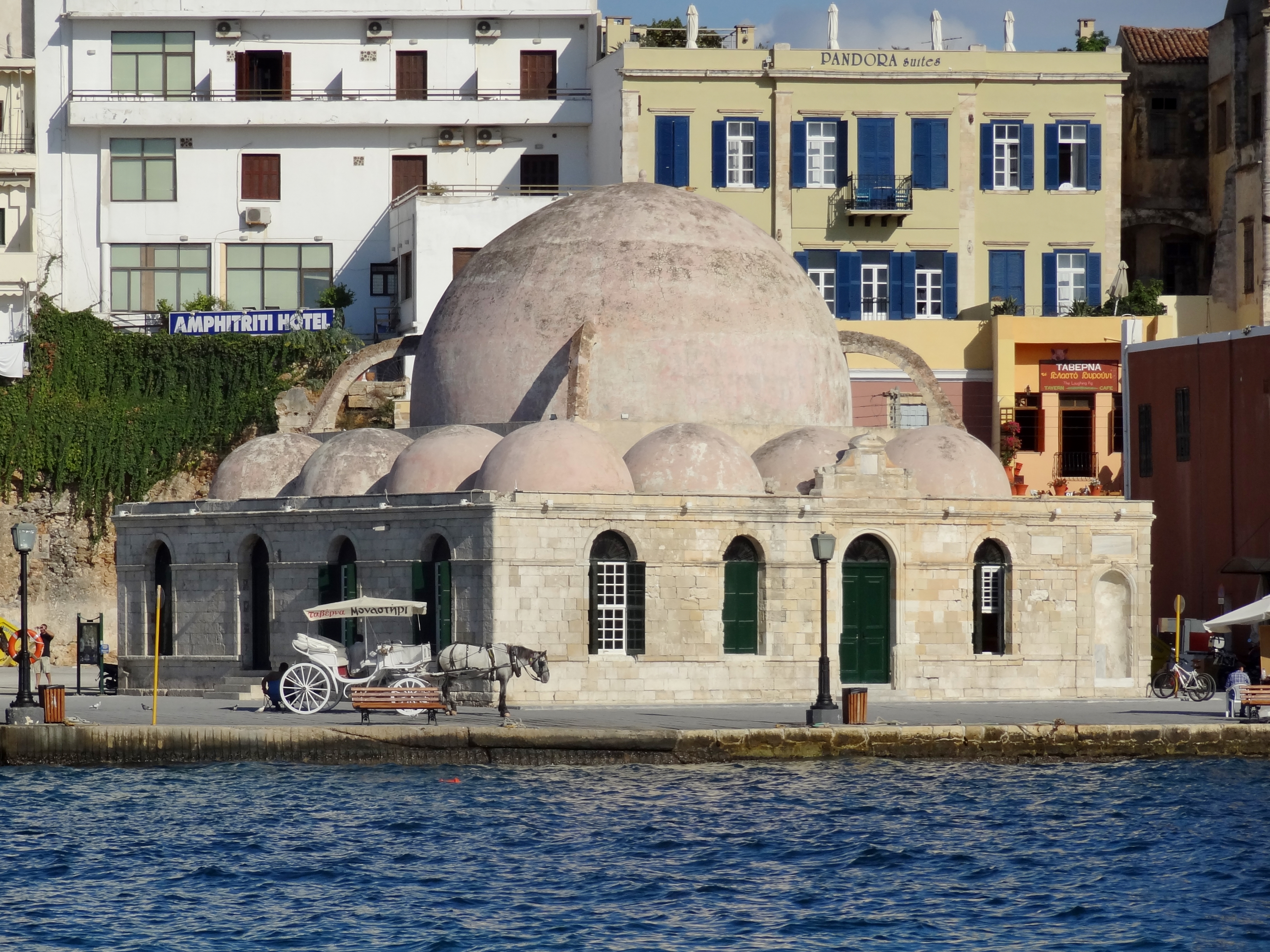 Hassan-Pascha-Moschee am Hafen von Chania, Gemeinde Chania, Regionalbezirk Chania, Kreta, Griechenland